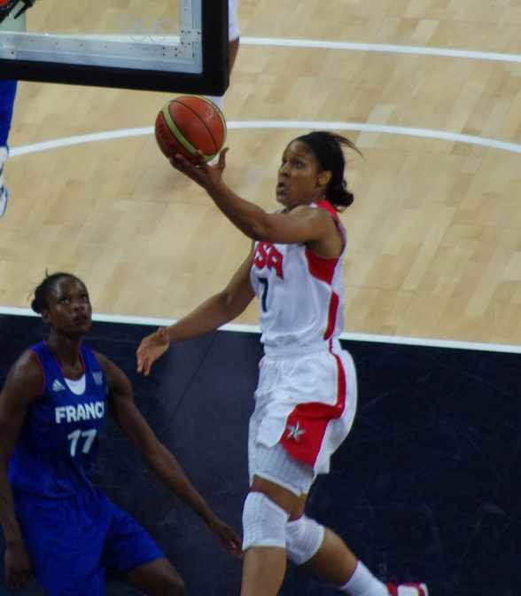 La basketteuse américaine Maya More marque en finale des jeux olympiques de 2012 face à la française Émilie Gomis.